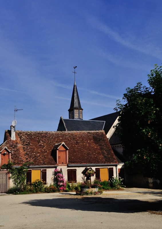 Place principale - Fontenay (Indre)